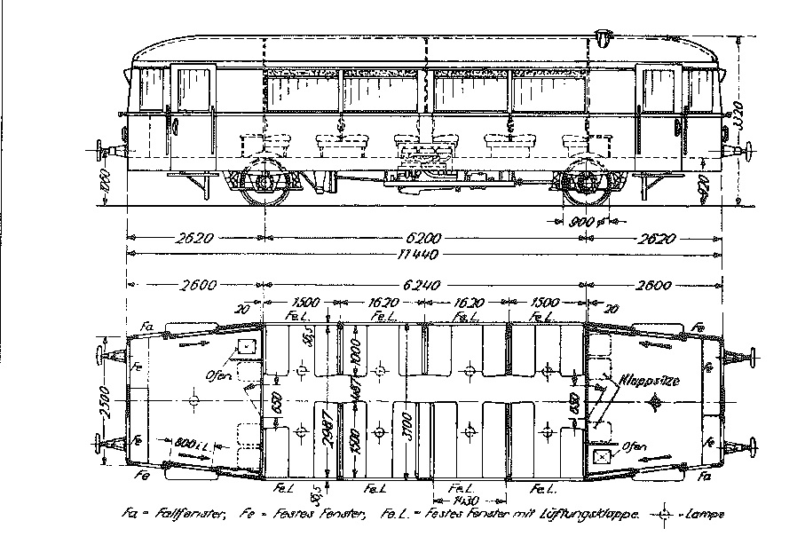 Maßskizze des WUMAG-Triebwagens mit 6,2 Meter Achsstand